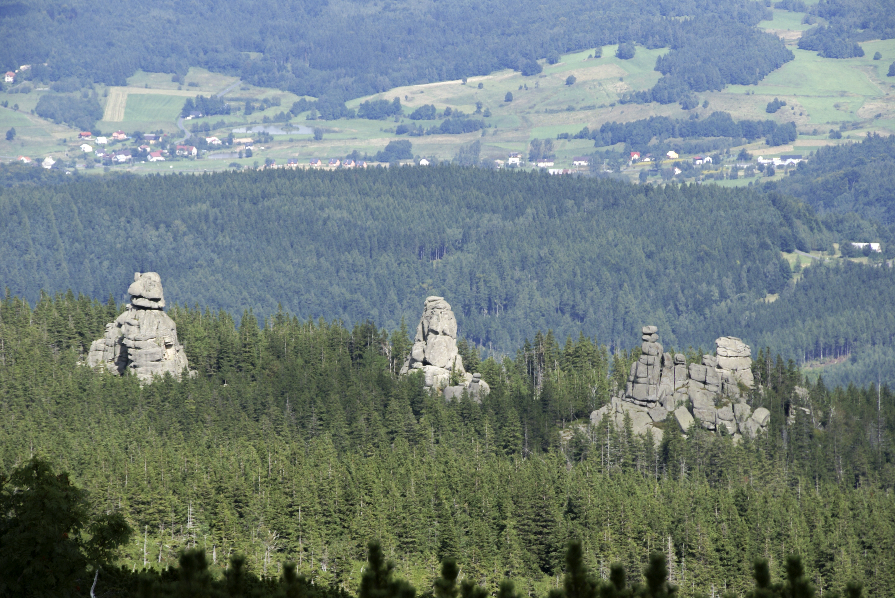 Pielgrzymy – formacja skał granitowych o wysokości dochodzącej do 25 m, zlokalizowana w Karkonoszach na wysokości 1204 m n.p.m.